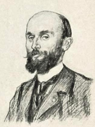 "M. Résal".